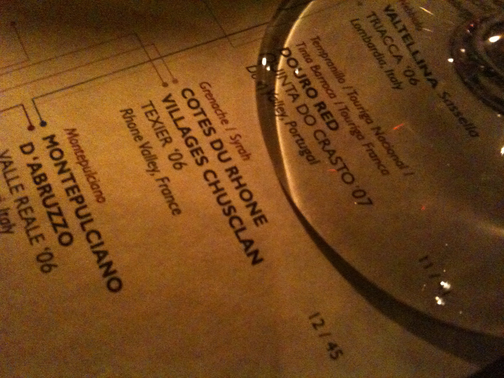 AOC côtes-du-rhône villages Chusclan à la City Winery de New York